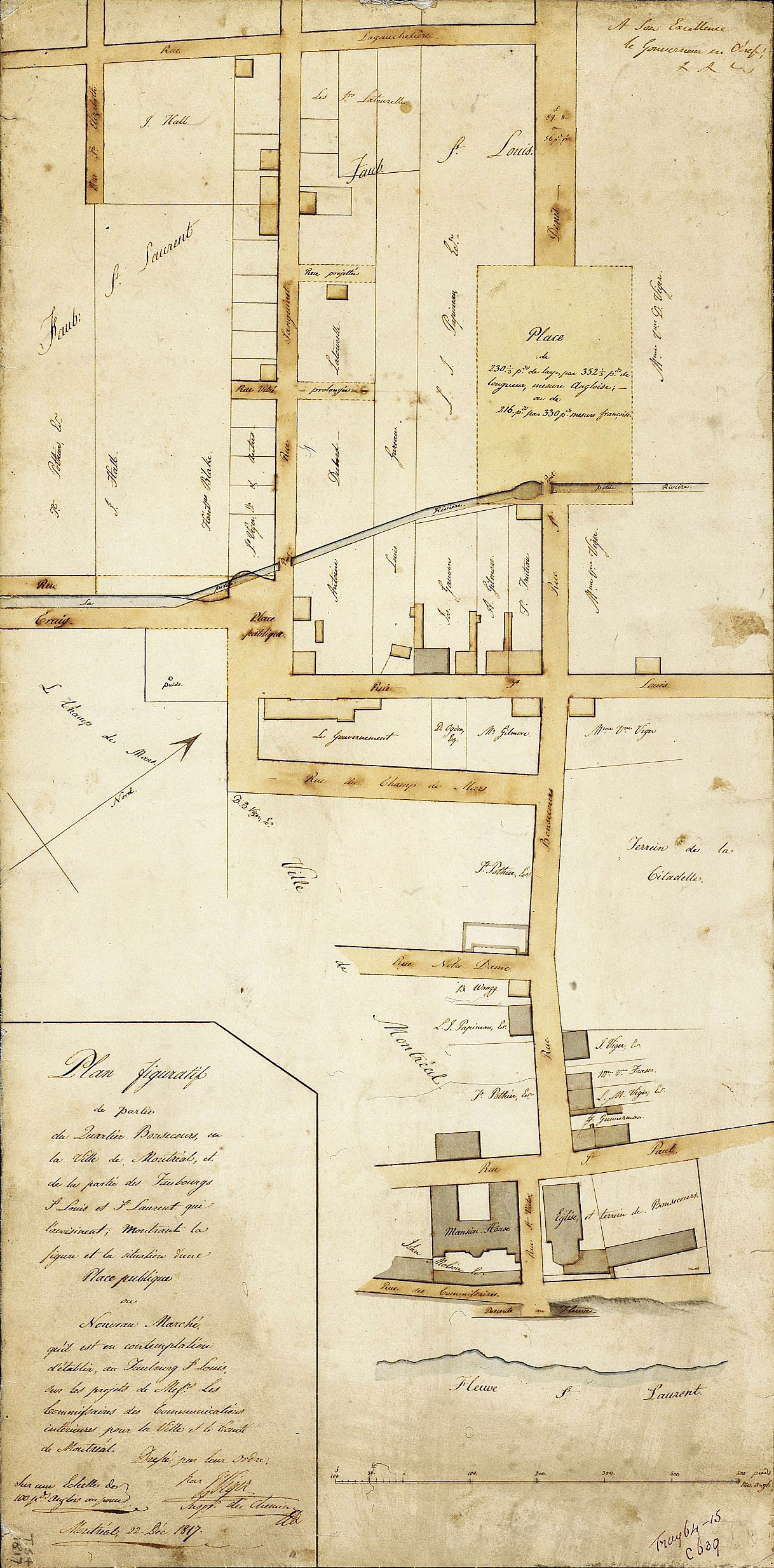 Plan figuratif de partie du Quartier Bonsecours, en la Ville de Montréal, et de la partie des Faubourgs St Louis et St Laurent qui l'avoisinent; montrant la figure et la situation d'une place publique ou Nouveau Marché, qu'il est en contemplation d'établir au Faubourg St Louis, sur les projets de Messrs les Commissaires des Communications intérieures pour la ville et le Comté de Montréal. Dressé par leur ordre, par J. Viger Insp des Chemins. Montréal, 22 déc. 1817.